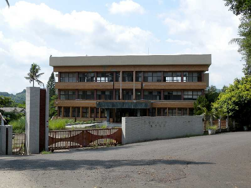 臺南玉井糖廠辦公大樓。